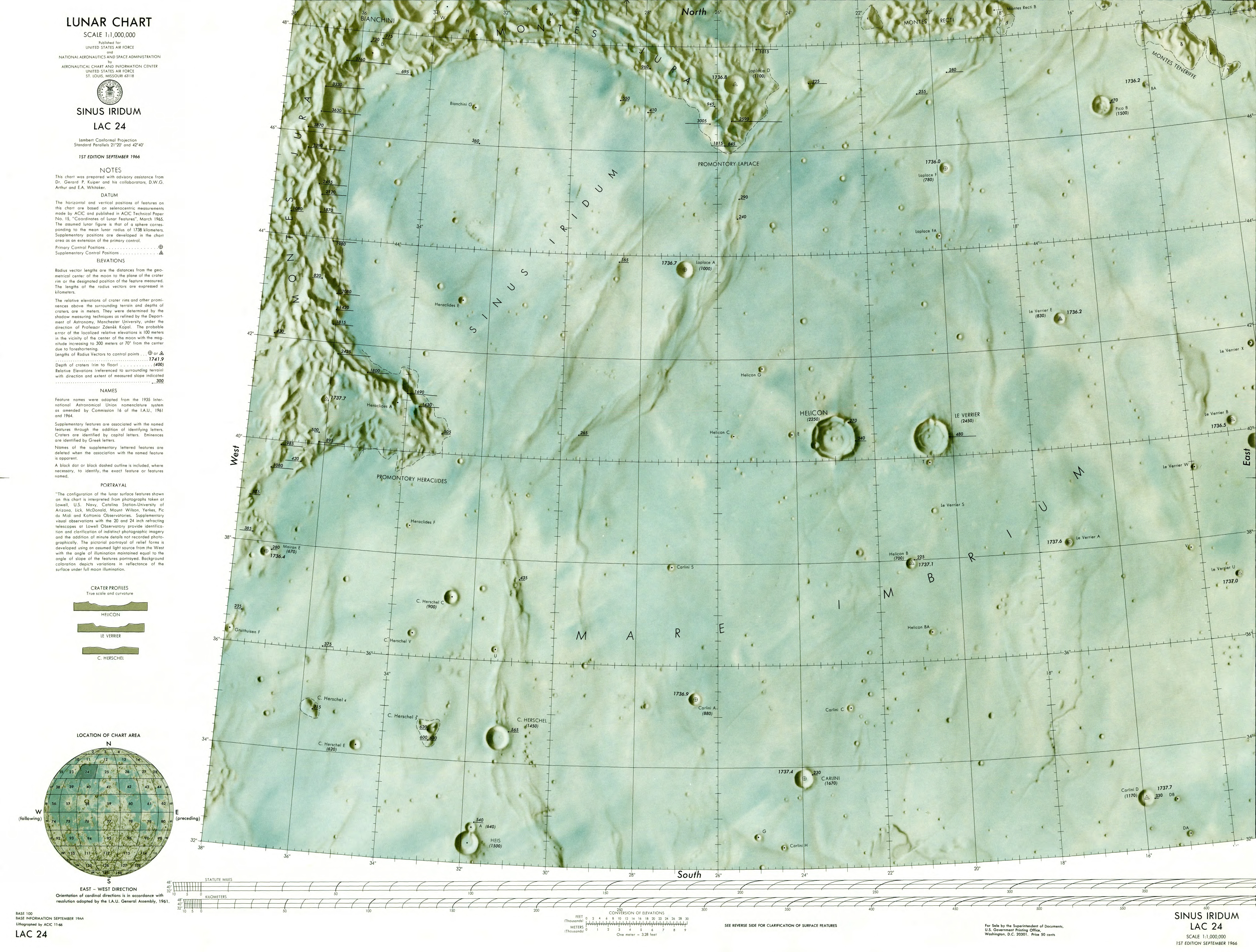 1:000 000 scale lunar chart - Sinus Iridum (LAC 24)